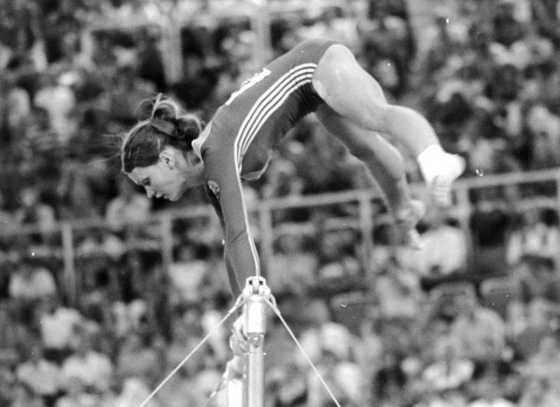 ADN-ZB/Olympiadienst/Kohls/28.8.1972/München XX.Olympische Sommerspiele- Turnen: In der Einzelwertung liegt nach der Pflicht am 27.8.1972 die DDR-Meisterin Karin Janz mit 38,15 Punkten auf Platz zwei. Für ihre Übung am Stufenbarren (Foto) erhielt sie mit 9,85 Punkten die höchste Wertung des ersten Wettkampftages der Turnerinnen.